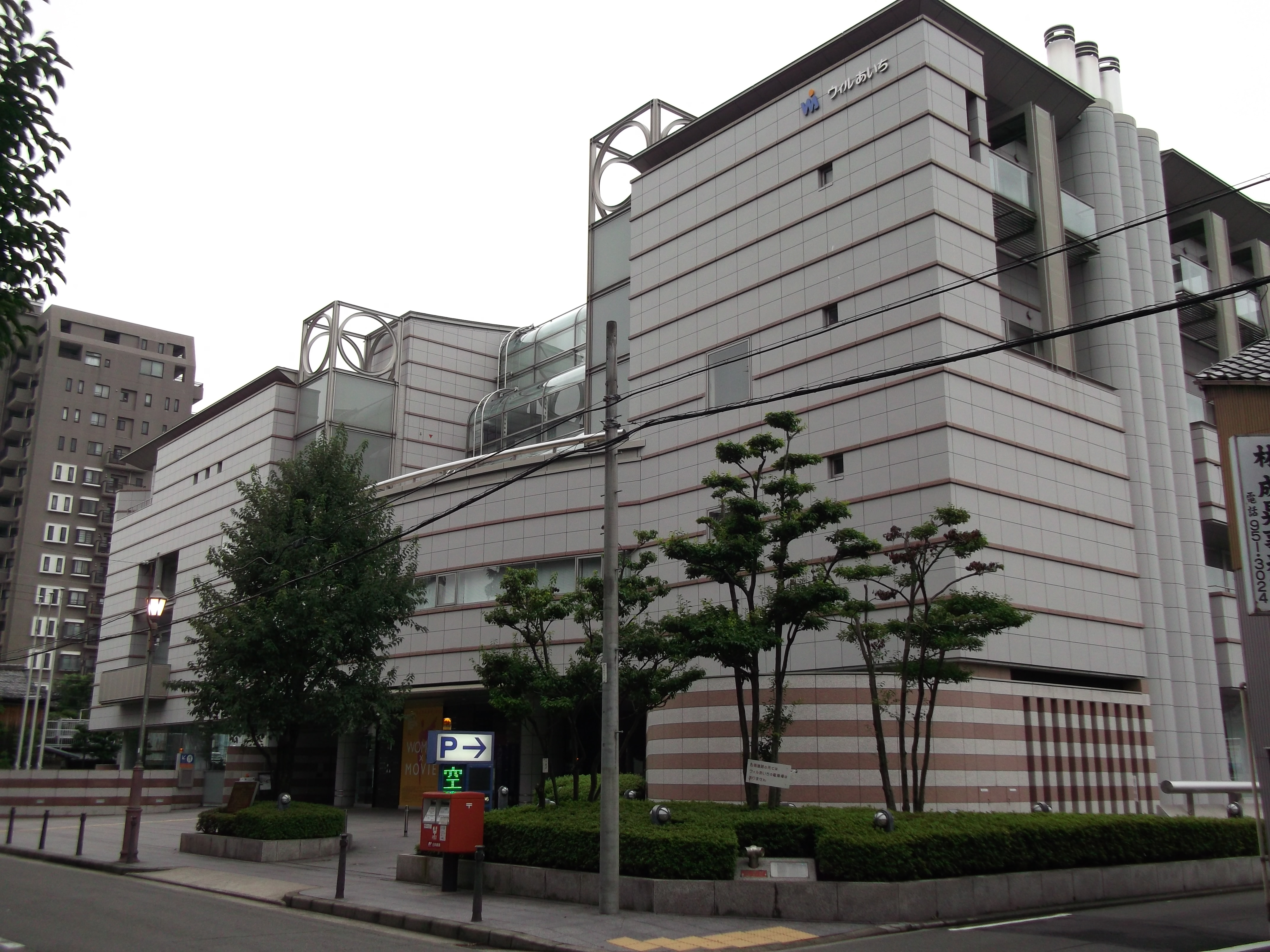 名古屋市東区上竪杉町の愛知県女性総合センターウィルあいちを北側公道西側より撮影